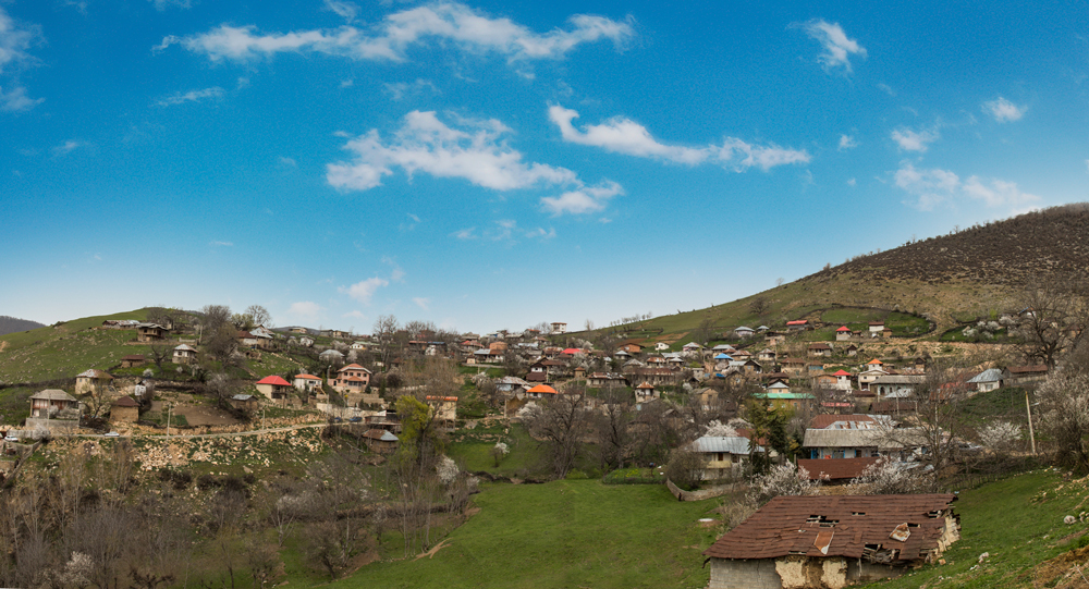 عکاس: علیرضا رضایی